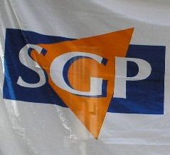 Het SGPlogo op een spandoek